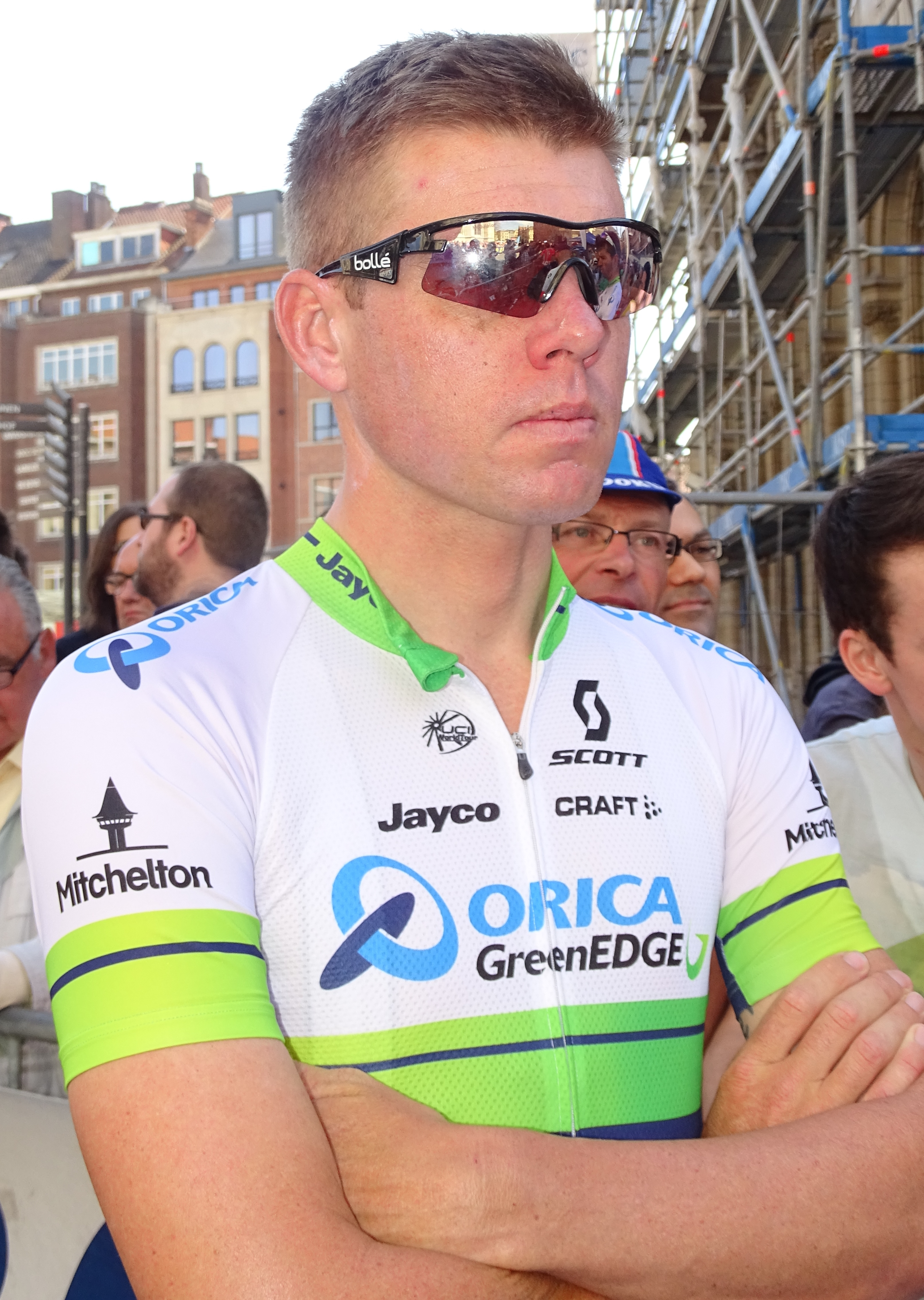 Reportage réalisé le mercredi 15 avril à l'occasion du départ de la Flèche brabançonne 2015 à Louvain, Belgique.